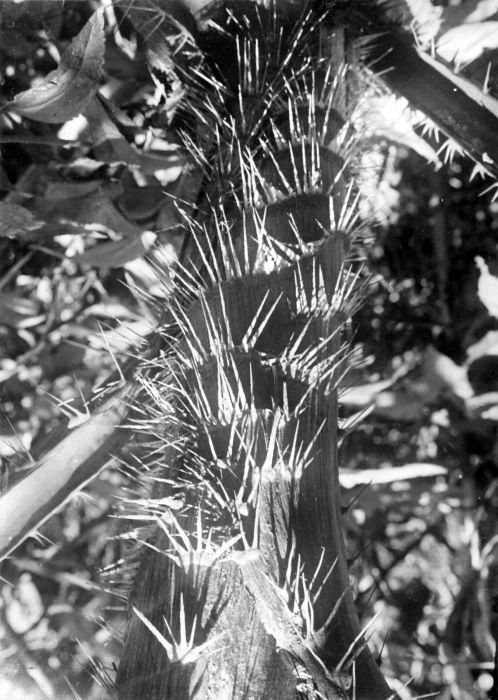 Repronegatief. Een rotan stam (Plectocomia elongata) in de bergtuin van 's Lands Plantentuin te Tjibodas, West-Java